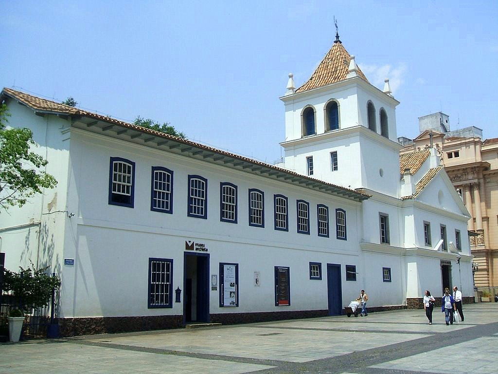 Pátio do Colégio, em São Paulo, Brasil